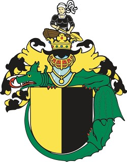 Znak města Česká Kamenice